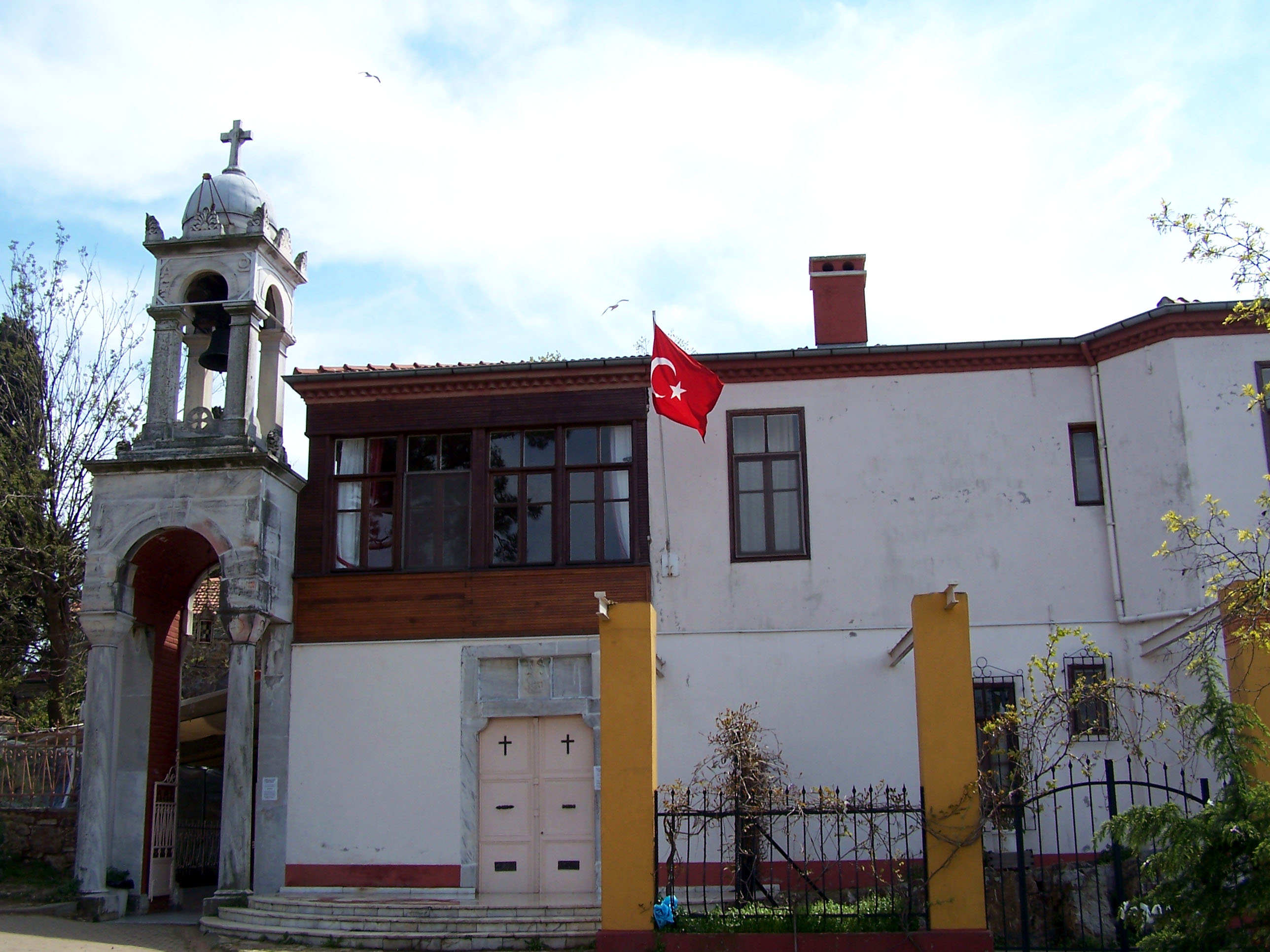 Agios Georgios Greek Orthodox Church (Aya Yorgi Rum Manastırı) in Büyükada, Turkey